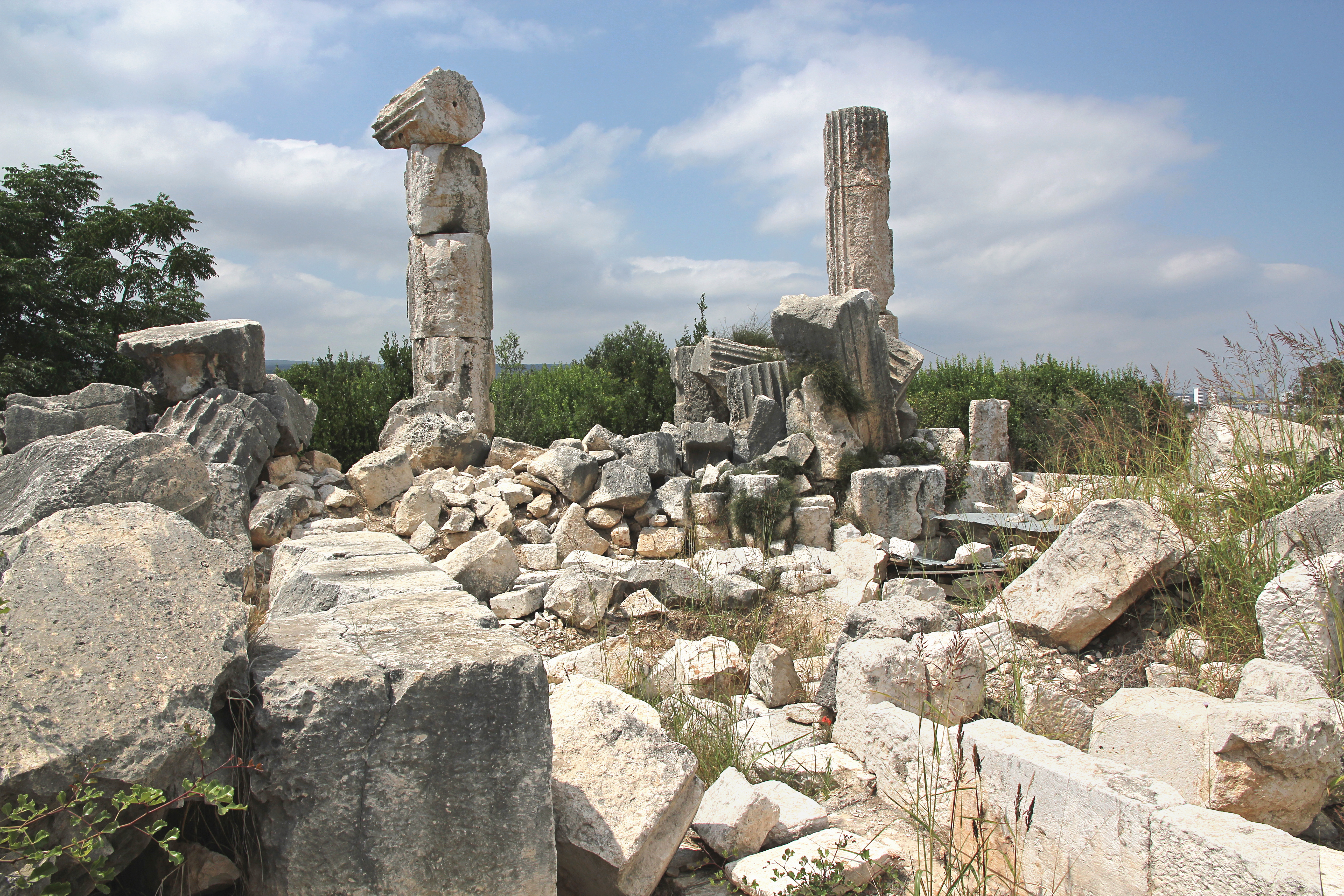 Elaiussa Sebaste, antike Stadt bei Erdemli, Südtürkei, römischer Tempel